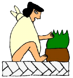 Glifo de Tianguistengo, Hidalgo